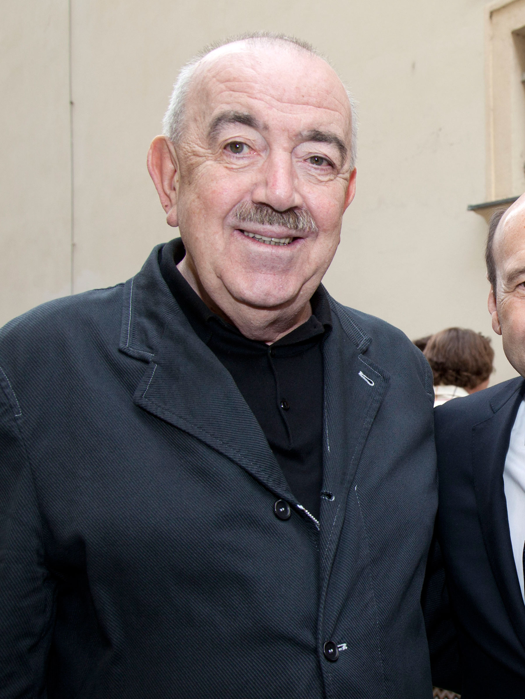 Springer_Georg-4572